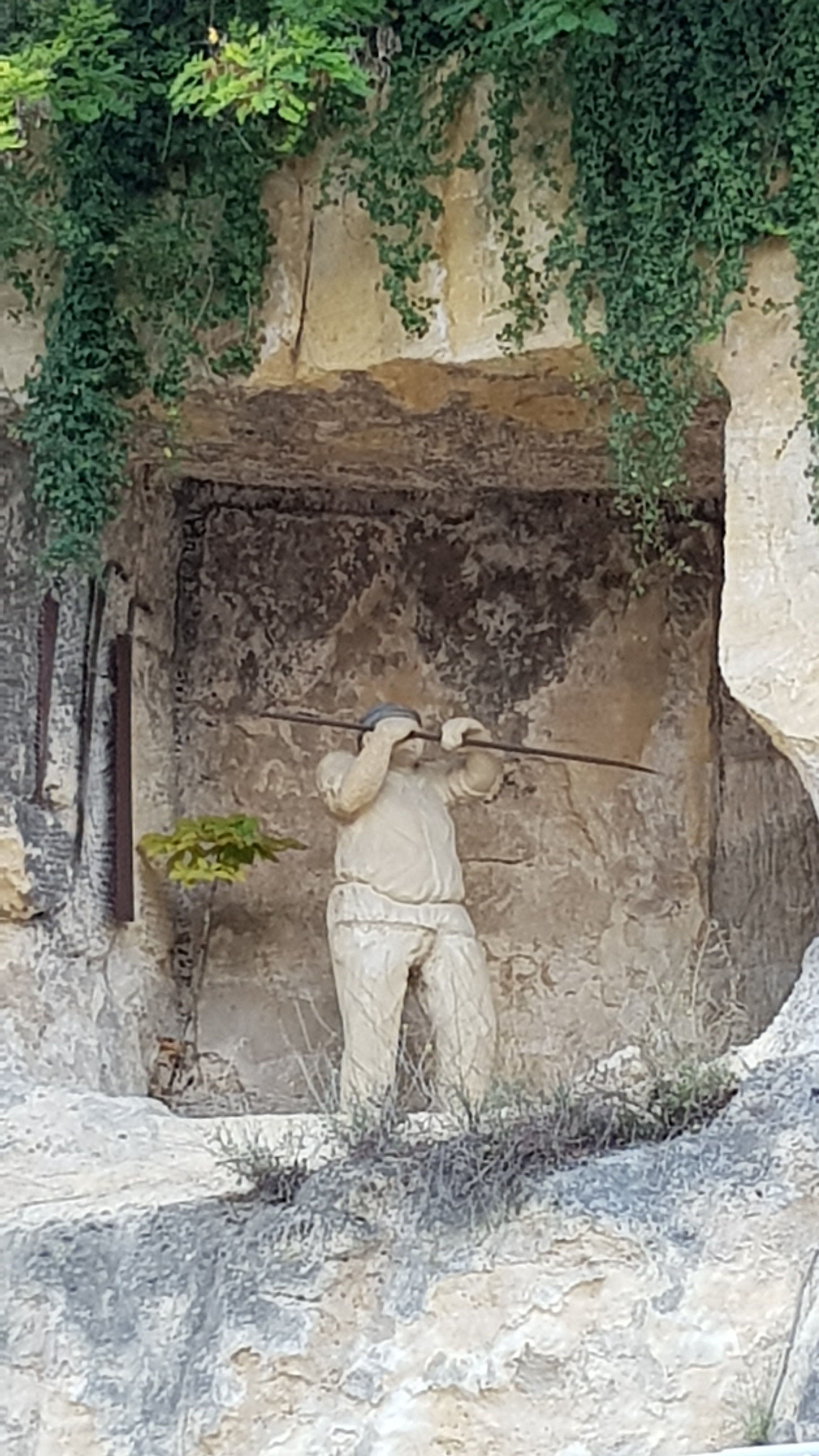 Blokbreker boven ingang Gemeentegrot, Valkenburg, Nederland